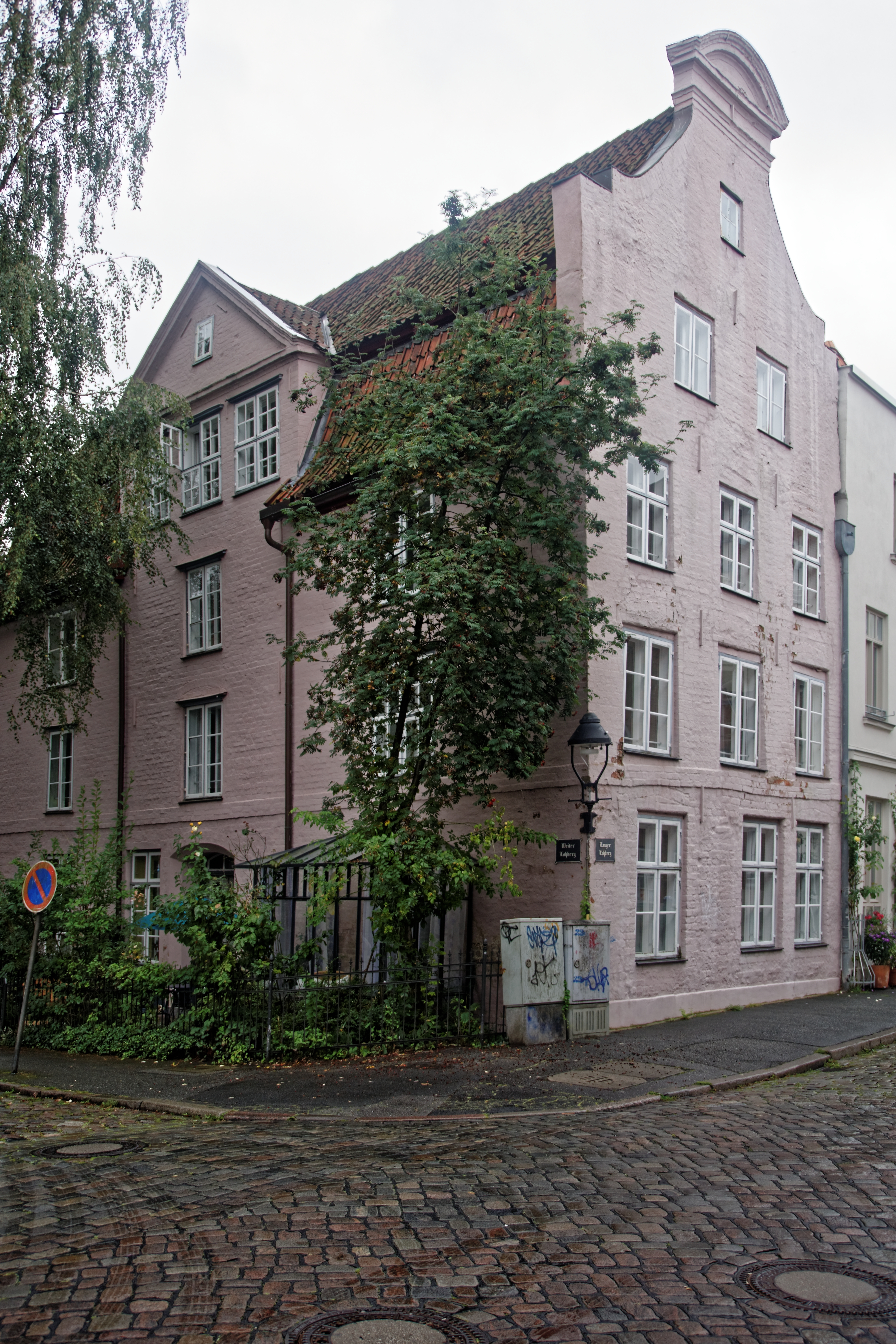 Lübeck, Weiter Lohberg 2